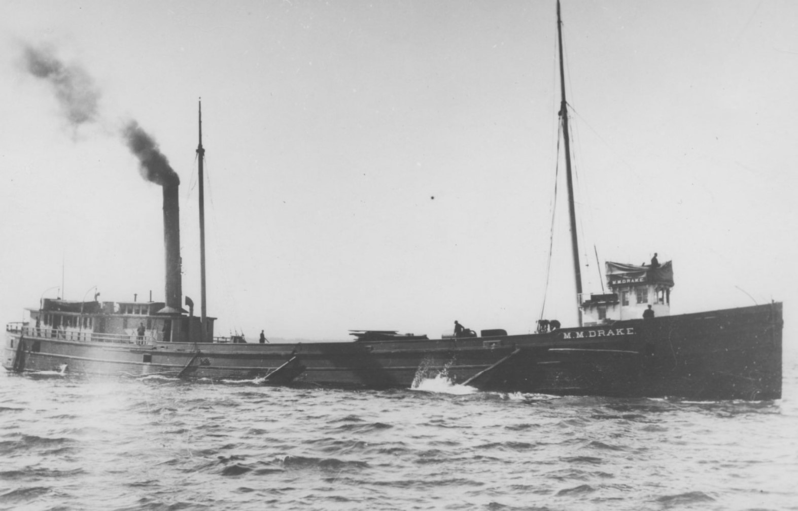 M.M. Drake underway